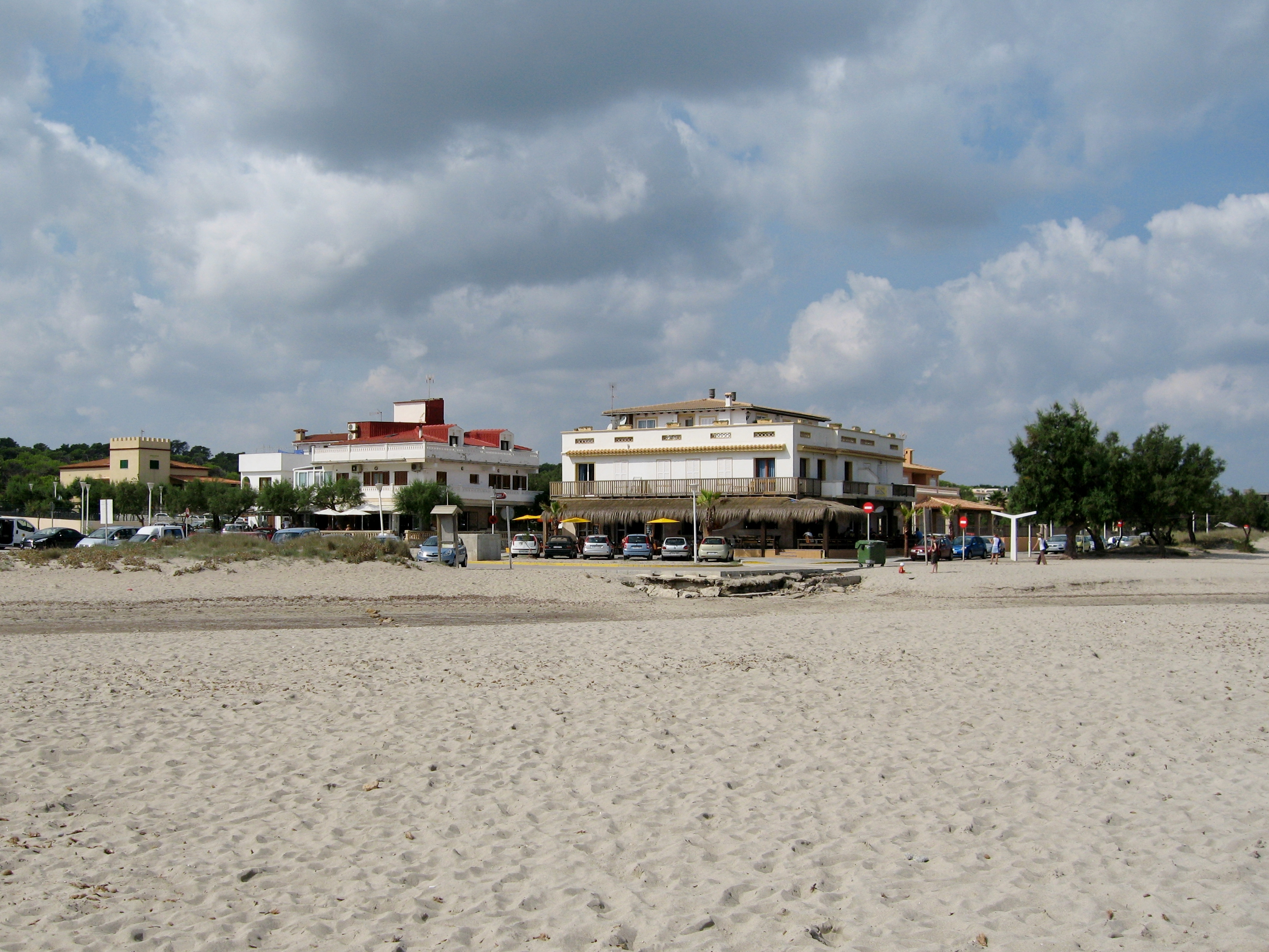 Son Serra de Marina, Santa Margalida, Mallorca, Spain